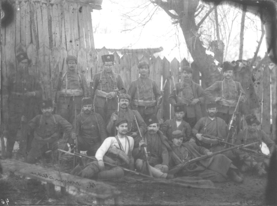 IMARO cheta K Mariovski, 1903